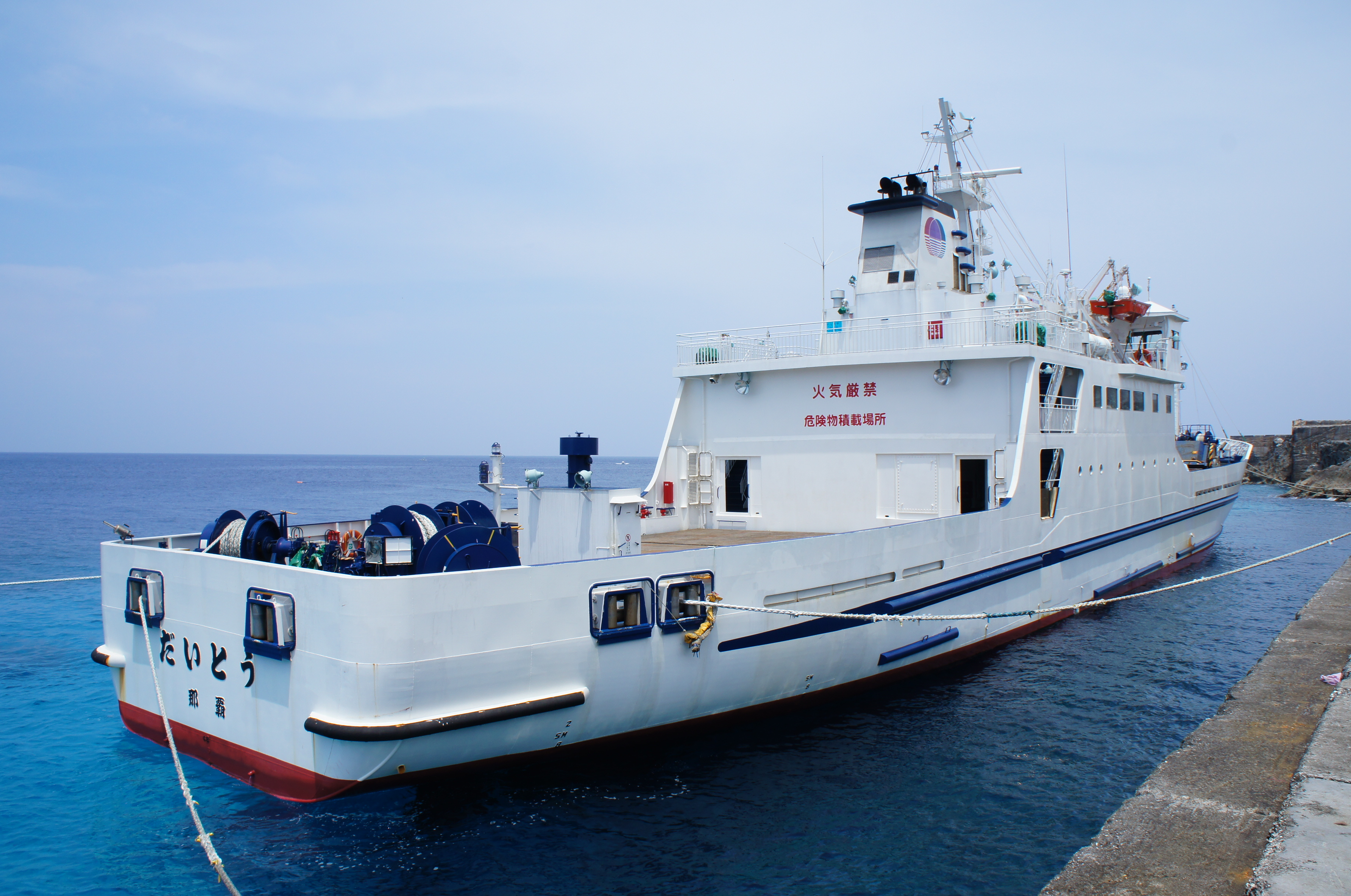 貨客船だいとうの船尾。北大東島の西港にて。